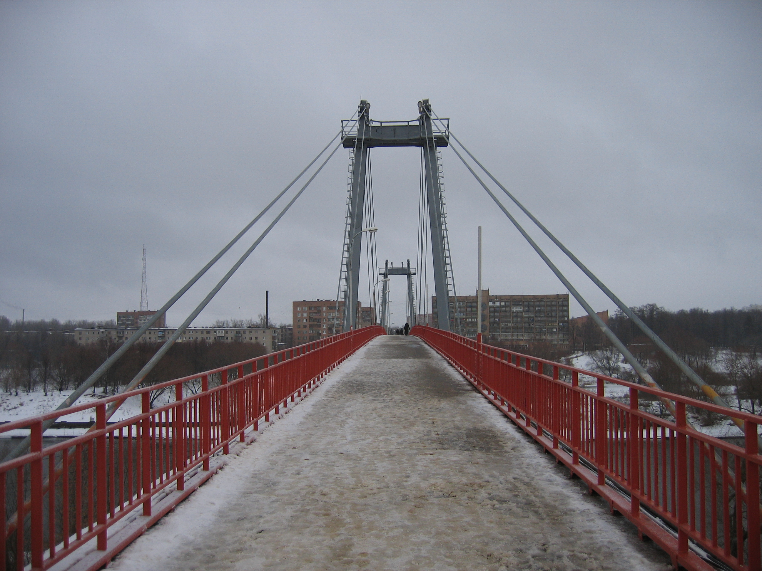 Fußgängerbrücke über die Moskwa in Woskressensk